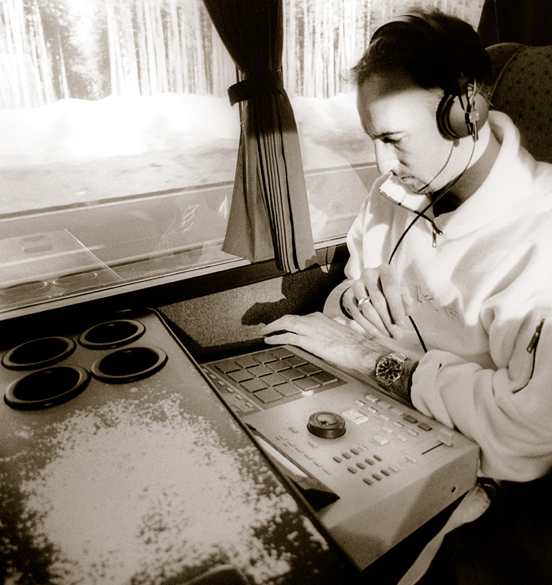 DJ Friction im Tourbus der deutschsprachigen Hip-Hop-Band Freundeskreis